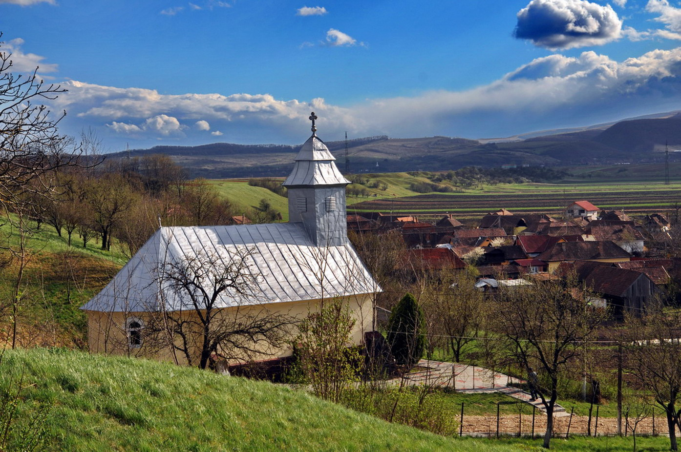 Corneşti (Mihai Viteazu), judeţul Cluj, fosta biserică greco-catolică (după 1948 trecută la cultul ortodox).